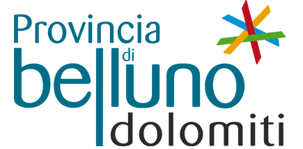 Il nuovo marchio della Provincia di Belluno